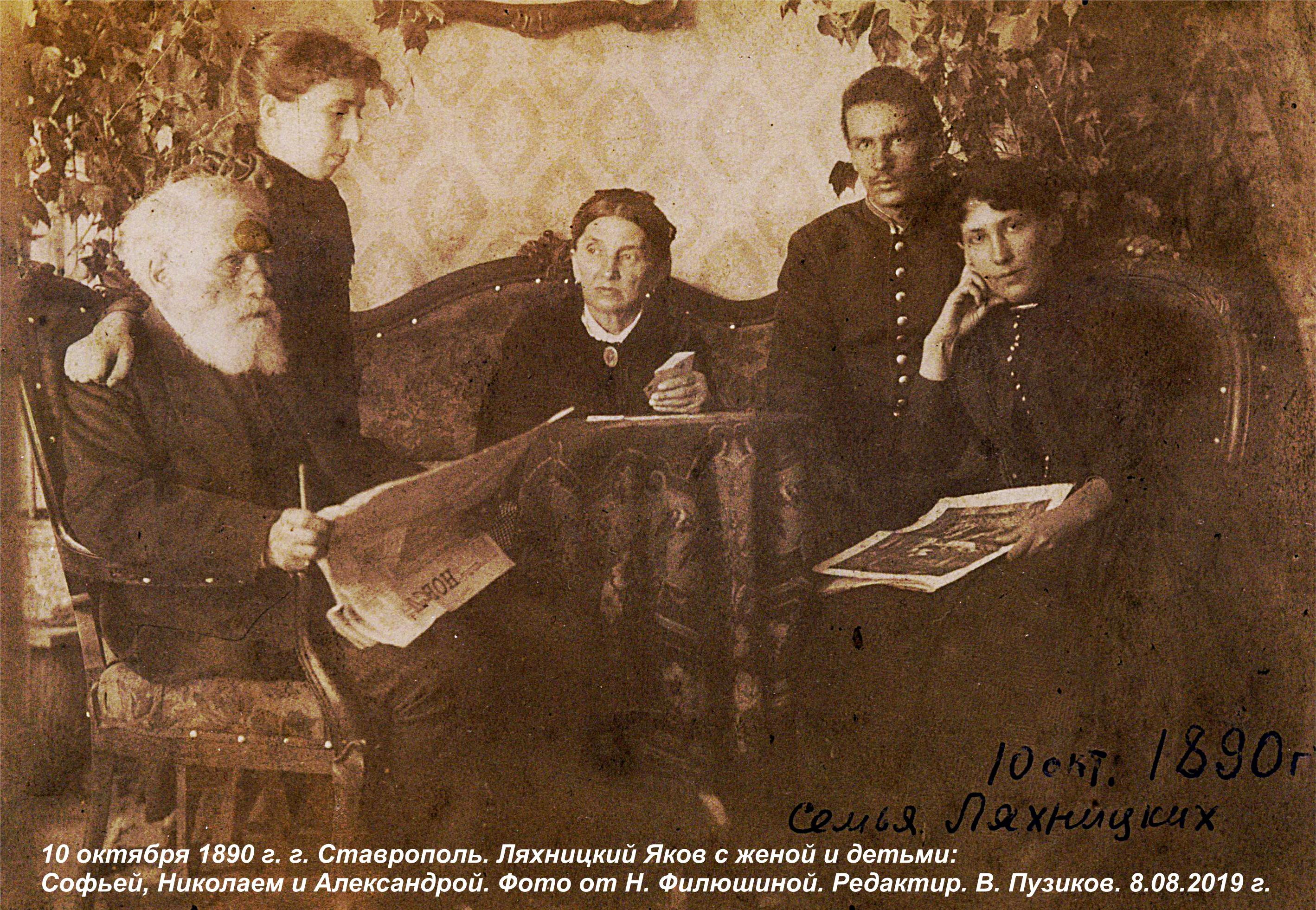 Николай Яковлевич Ляхницкий (1871—?) — присяжный поверенный, член Государственной думы III созыва от Ставропольской губернии, его родители и сестры Софья и Александра (?),10 октября 1890